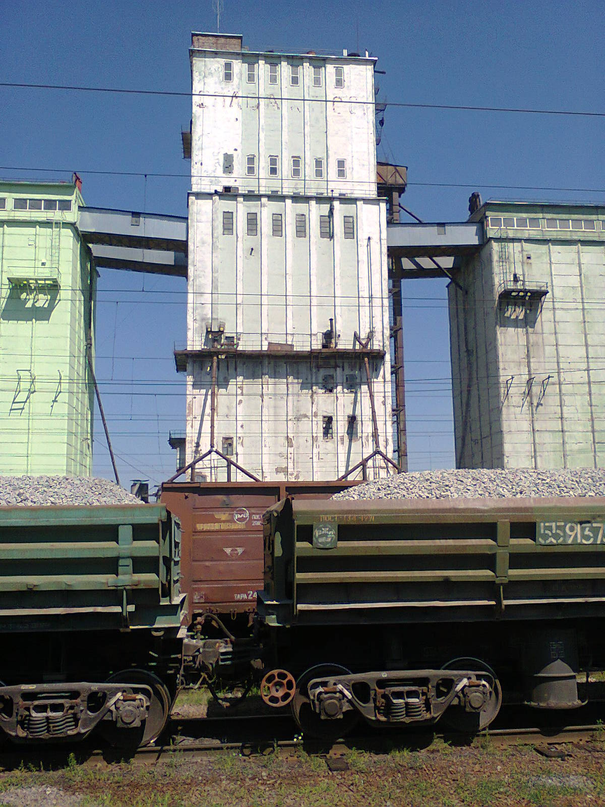 Здание элеватора на железнодорожной станции Таловая